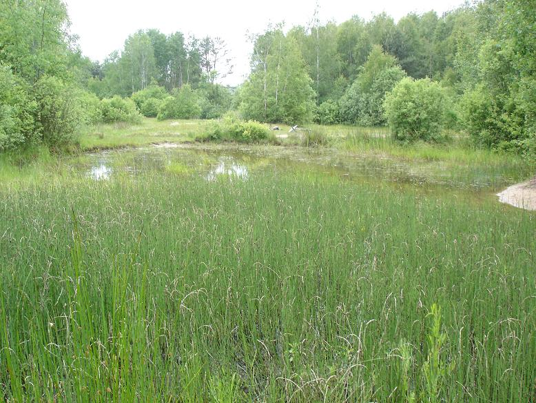 PP Na Plachtě (býv. vojenský prostor) mokřady a tůně, obnovené v rámci revitalizací